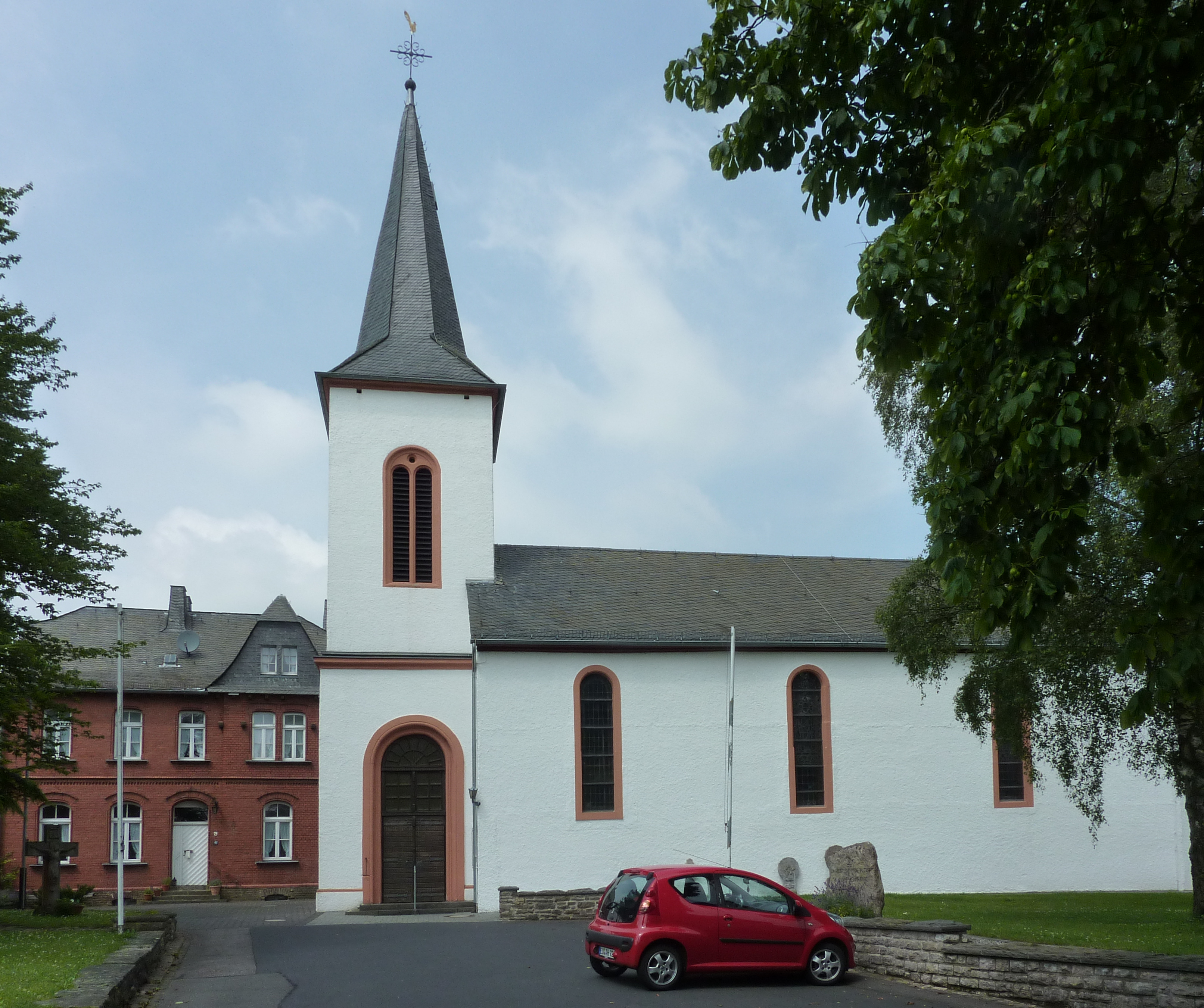 Blankenheimerdorf, Nürburgstr. 60, kath. Pfarrkirche, von S